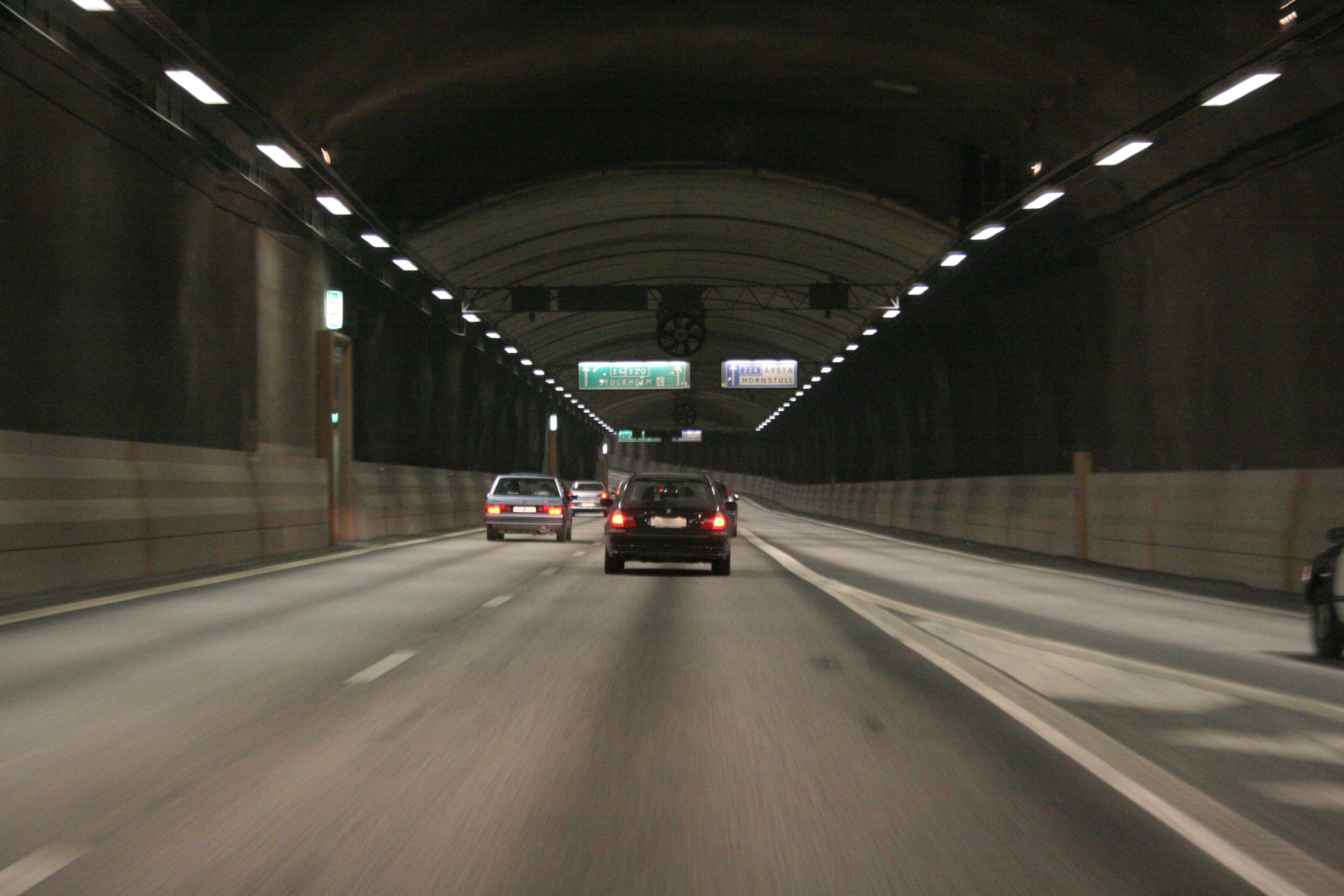 Södra länken, westbound in Årstatunneln. Riksväg 75, Stockholm Sweden.